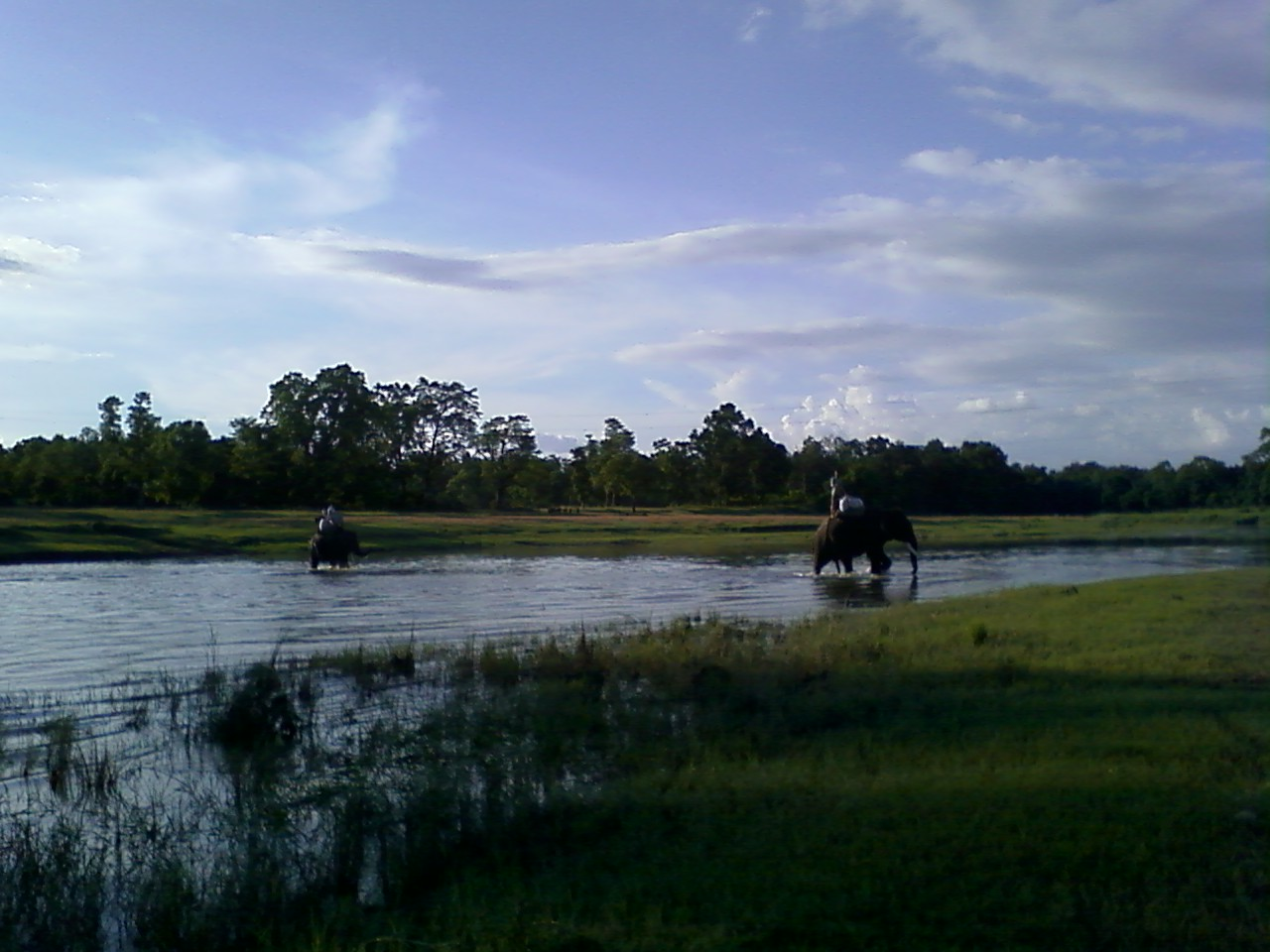 치트완 국립공원입니다! 작년 여름에 찍은 사진.